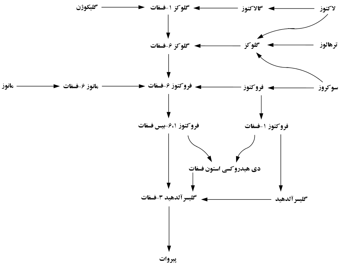 مسیرهای شکست قندهای مختلف در قندکافت (گلیکولیز)